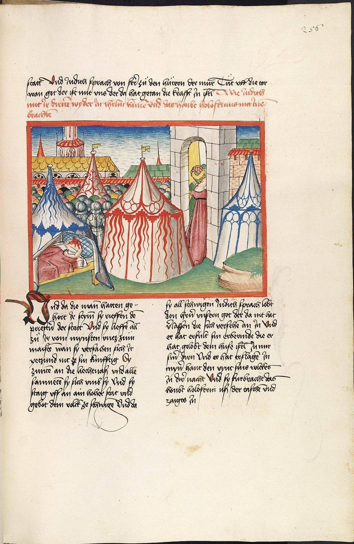 Codex Palatinus germanicus 17, Blatt 256r - Bibel, Altes Testament, Buch Judit: Judith verlässt mit ihren Dienerinnen das Lager des Holofernes und kehrt in die Stadt zurück. (Cpg 17 = Bibel AT, deutsch, Bücher Könige, Chroniken, Esra, Tobias, Judit, Ester, Hiob)